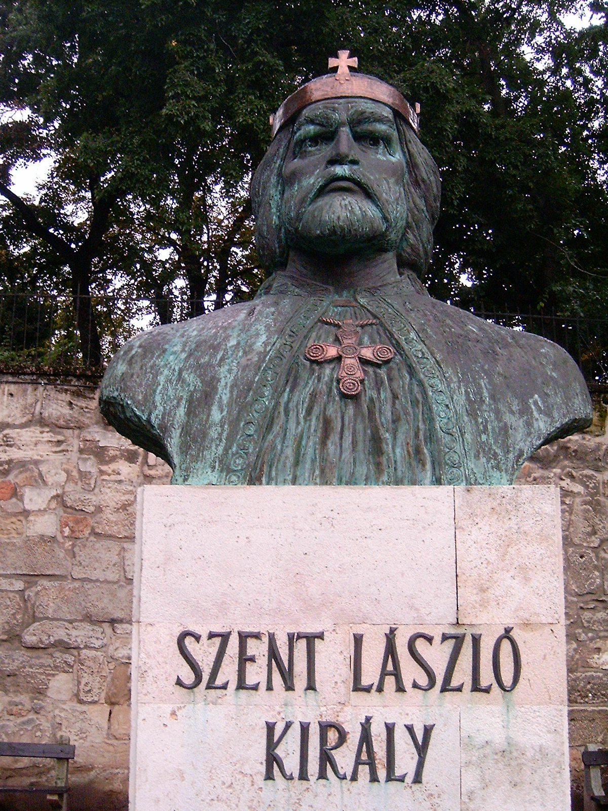 Szent László király szobra Székesfehérváron a Püspöki Palota kertje mögött található kis téren. A szobor Schwalm László 1995-ös alkotása